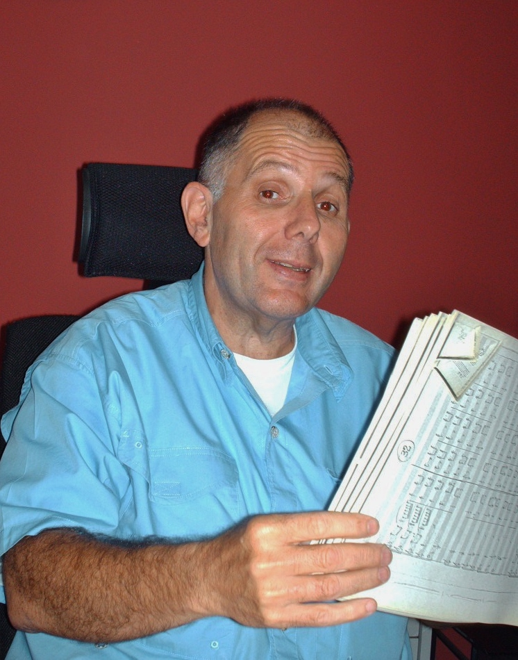 Director de orquesta venezolano. 2013.